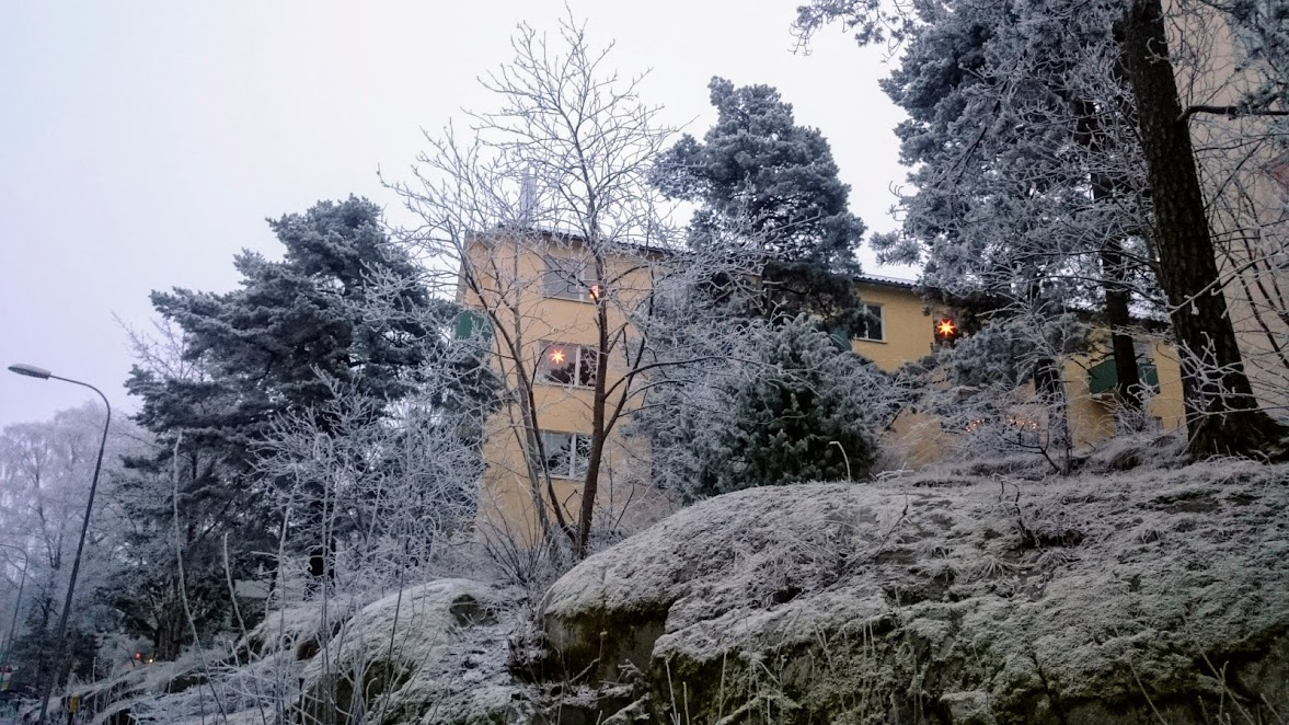 Läckövägen 7 i Björkhagen en vinterdag 2018.